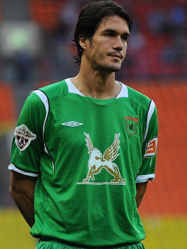 Сесар Навас на матче "Спартак Москва - Рубин Казань"